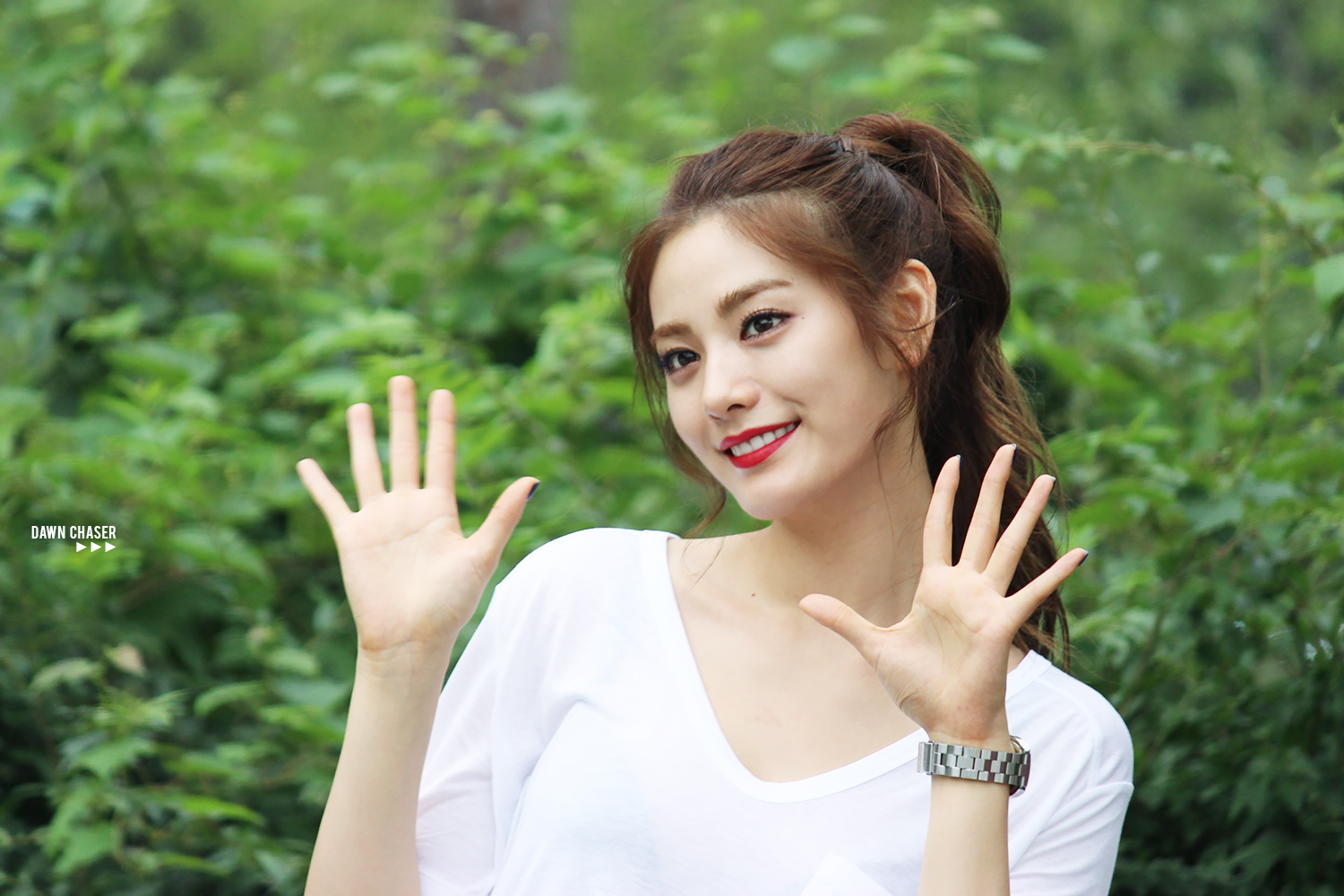 140824 나처럼해봐요 미니팬미팅 나나